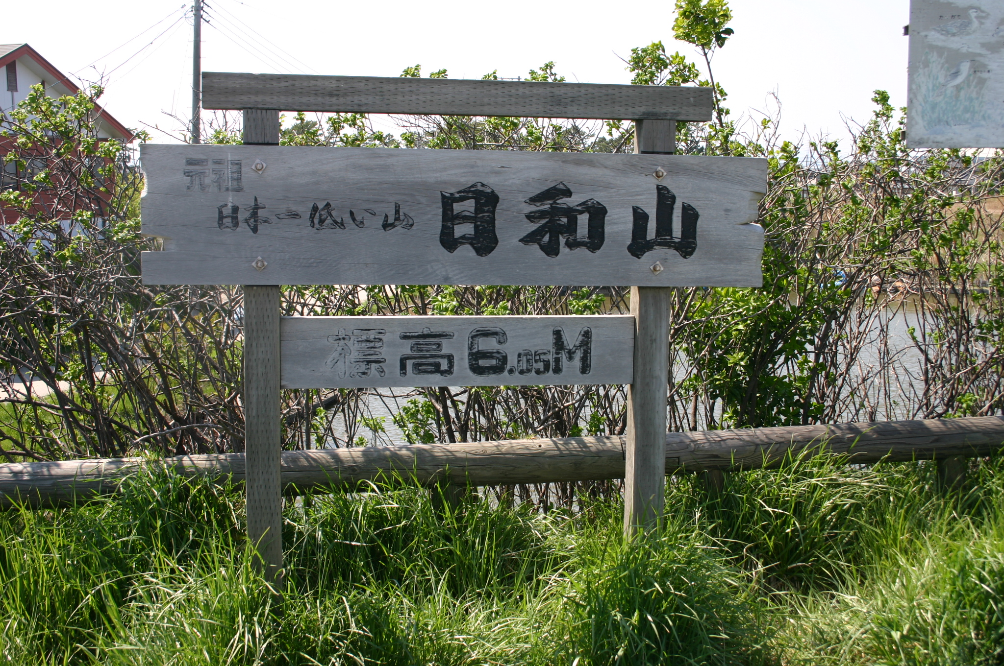 被災前の日和山看板